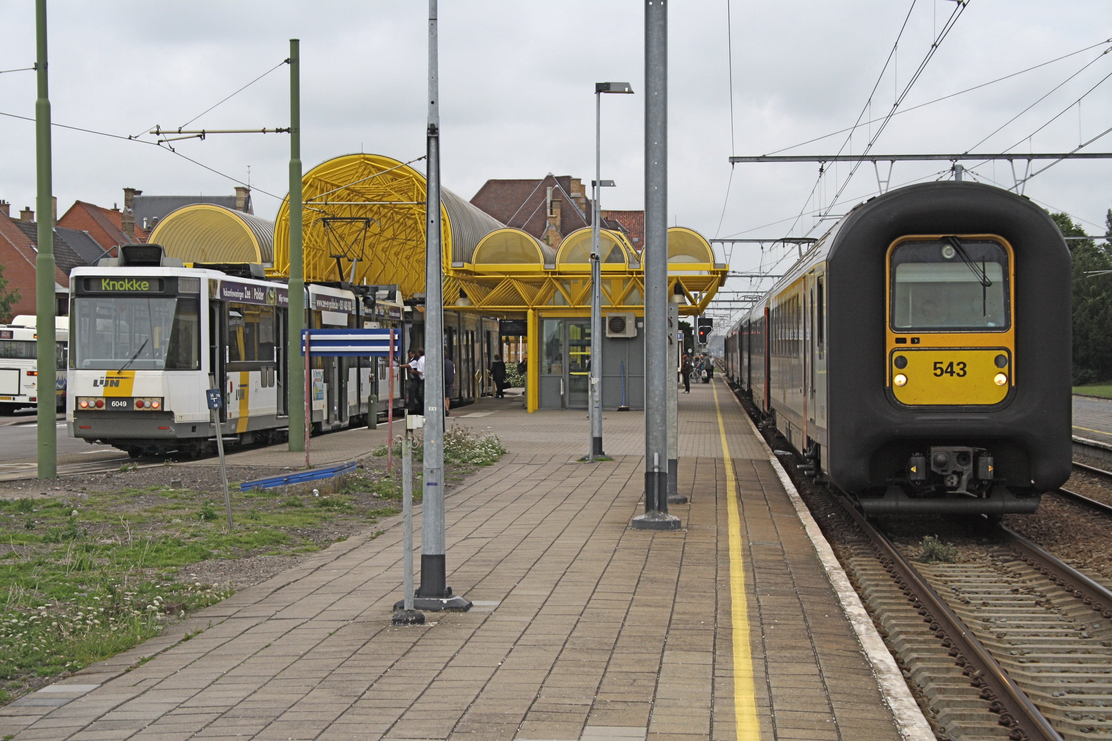 Straßenbahnhaltestelle De Panne Station der belgischen Kusttram, die alle Orte der flämischen Nordseeküste miteinander verbindet